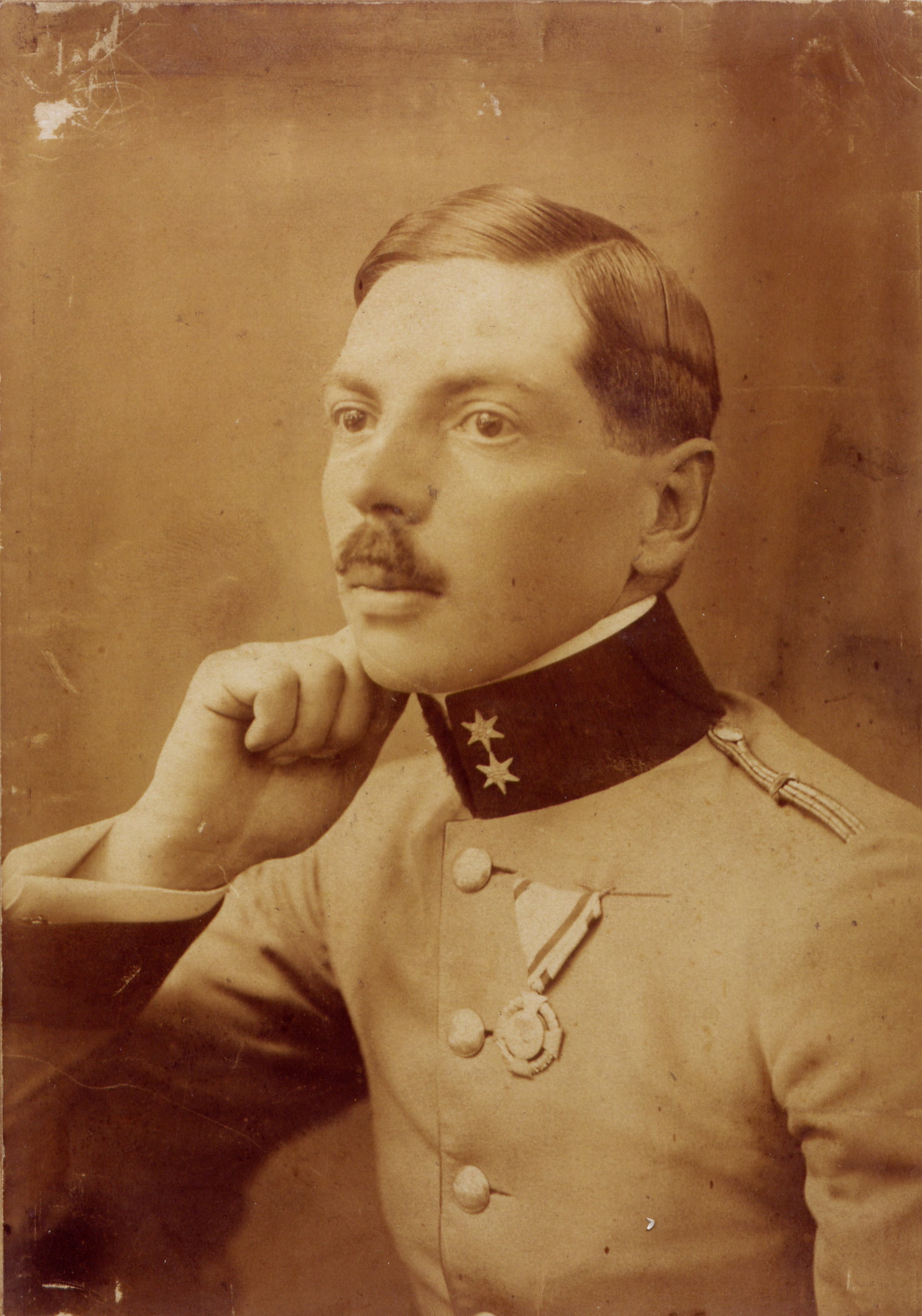 Generalmajor Camillo Bregant (1879-1956) in der Uniform eines Oberleutnants ca. 1908; an der Brust das Militär-Jubiläumskreuz 1908.